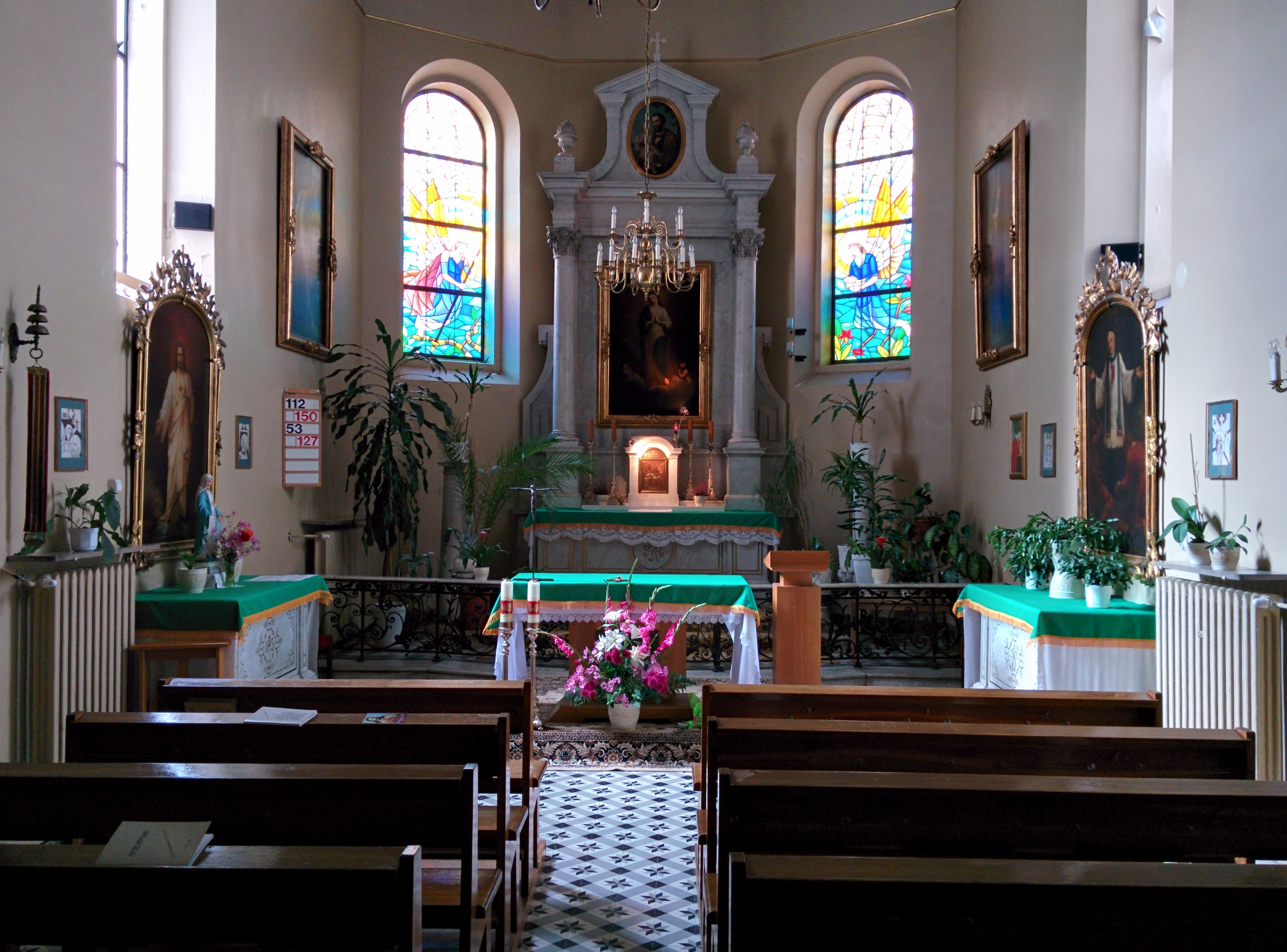 Kielce, kaplica szpitalna, 1864 r.